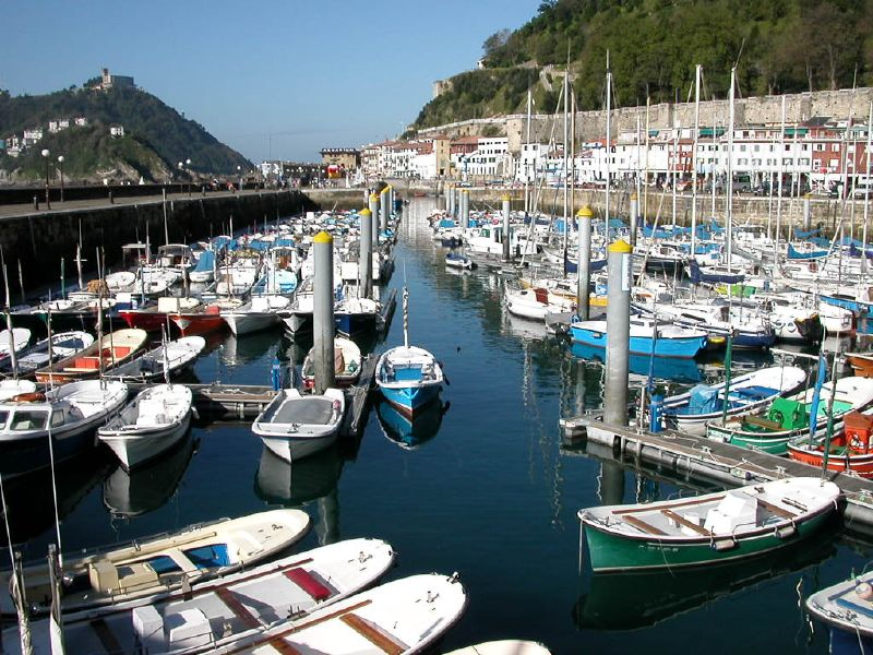 Puerto de San Sebastián (Euskadi, España)